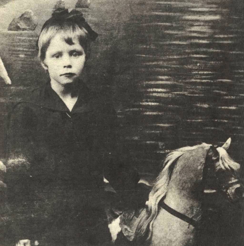 Люба Шевцова в шестилетнем возрасте